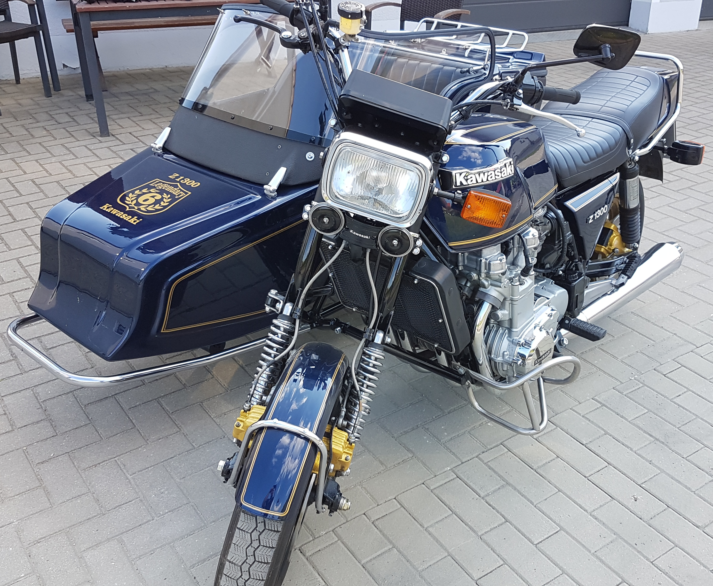 Kawasaki Z1300